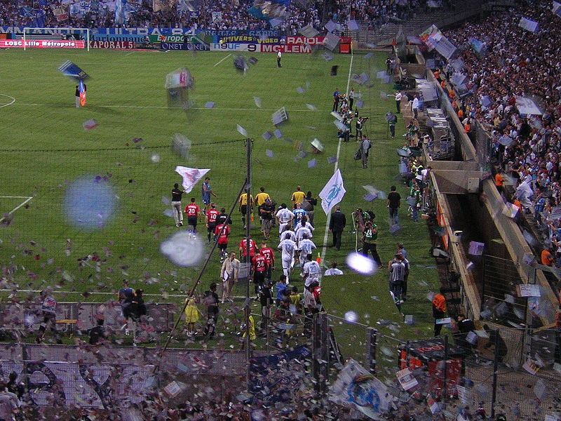 Entrée des joueurs OM-LOSC, vu du Virage Nord.